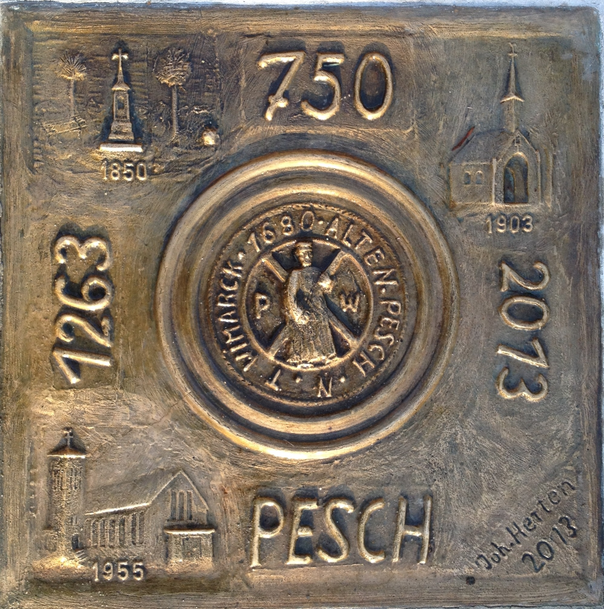 Bronzeplatte 750 Jahre Pesch (Johannes Herten 2013)